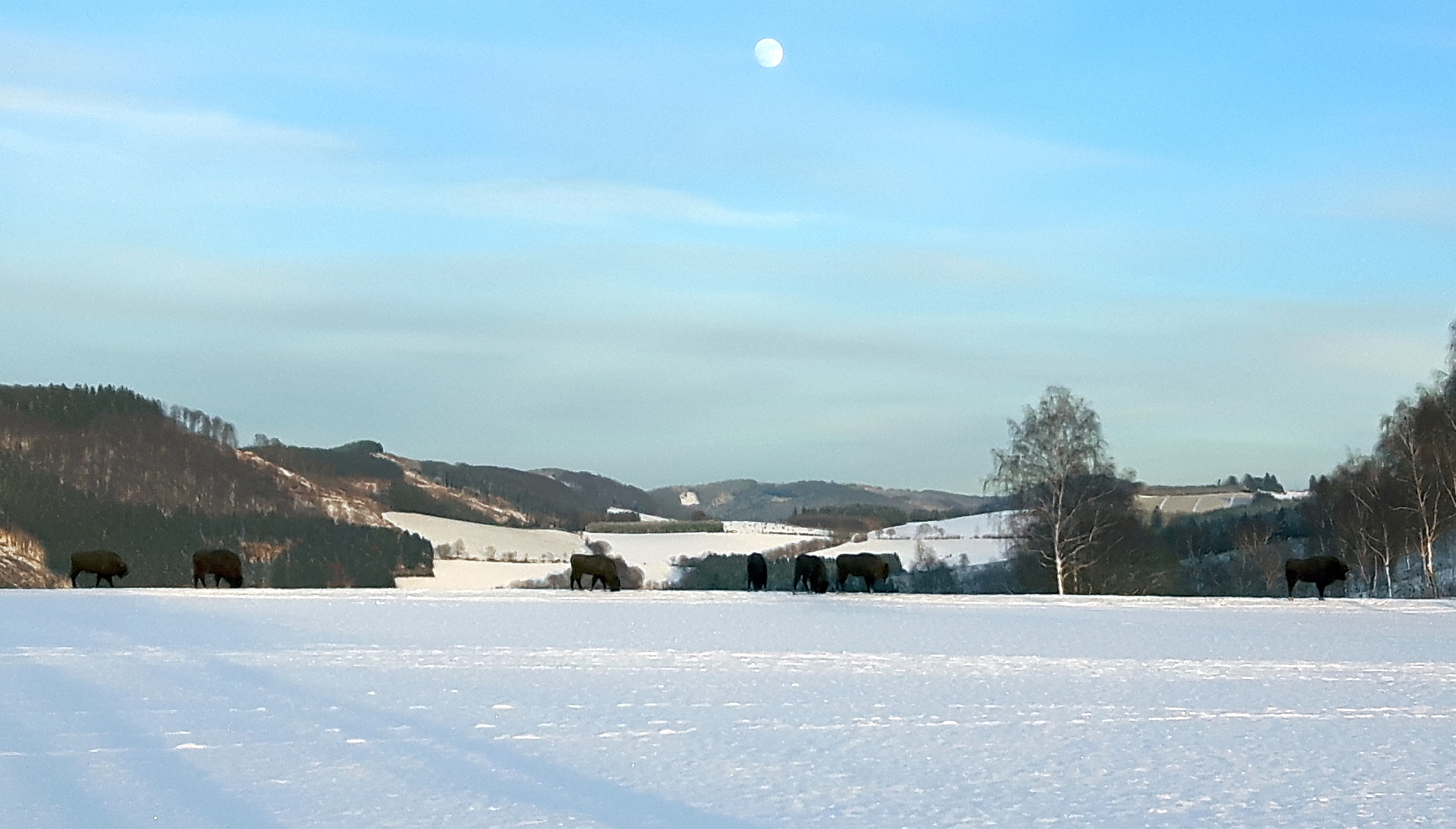 Schmallenberg-Almert, freilebende Wisente